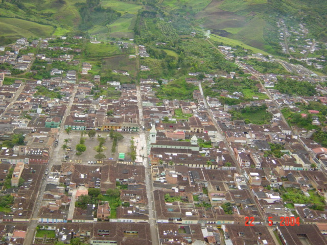 Esta es la población de Urrao en el departamento de Antioquia en Colombia.